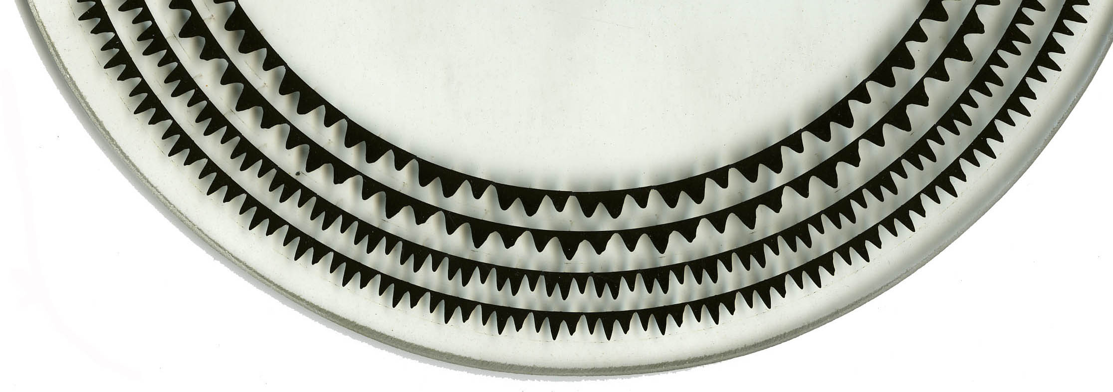 Ausschnitt aus einer Versuchsscheibe für die Lichttonorgel. Clipping of a test-disc for the phototone-organ. Eigene Aufnahme.